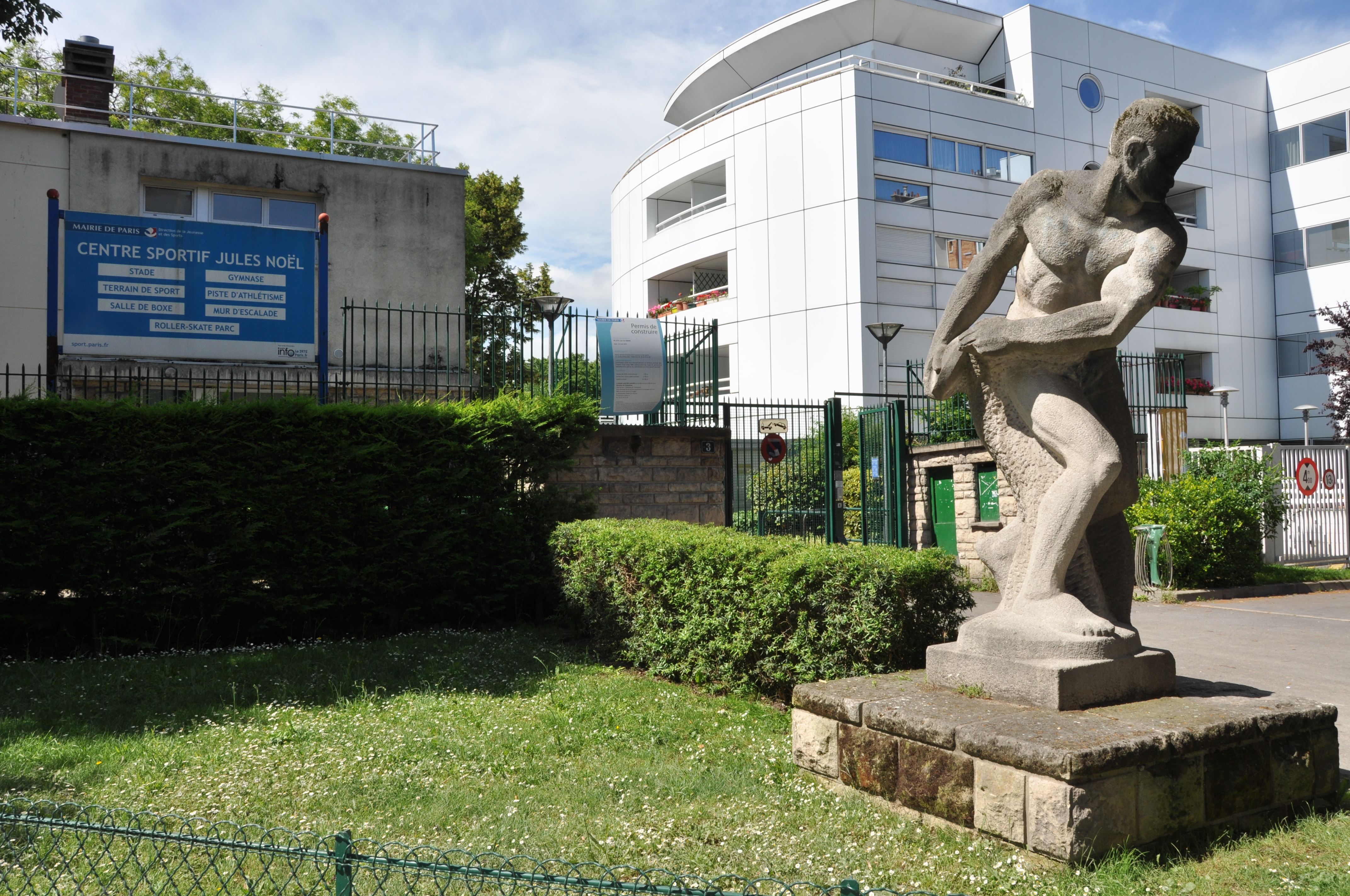 Jules Noel, centre sportif de Paris